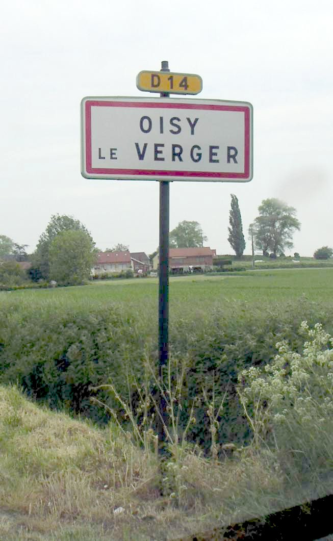 Entrée de Oisy-le-Verger image prise par Padawane le 19 mai 2005 (pas de ©) Padawane